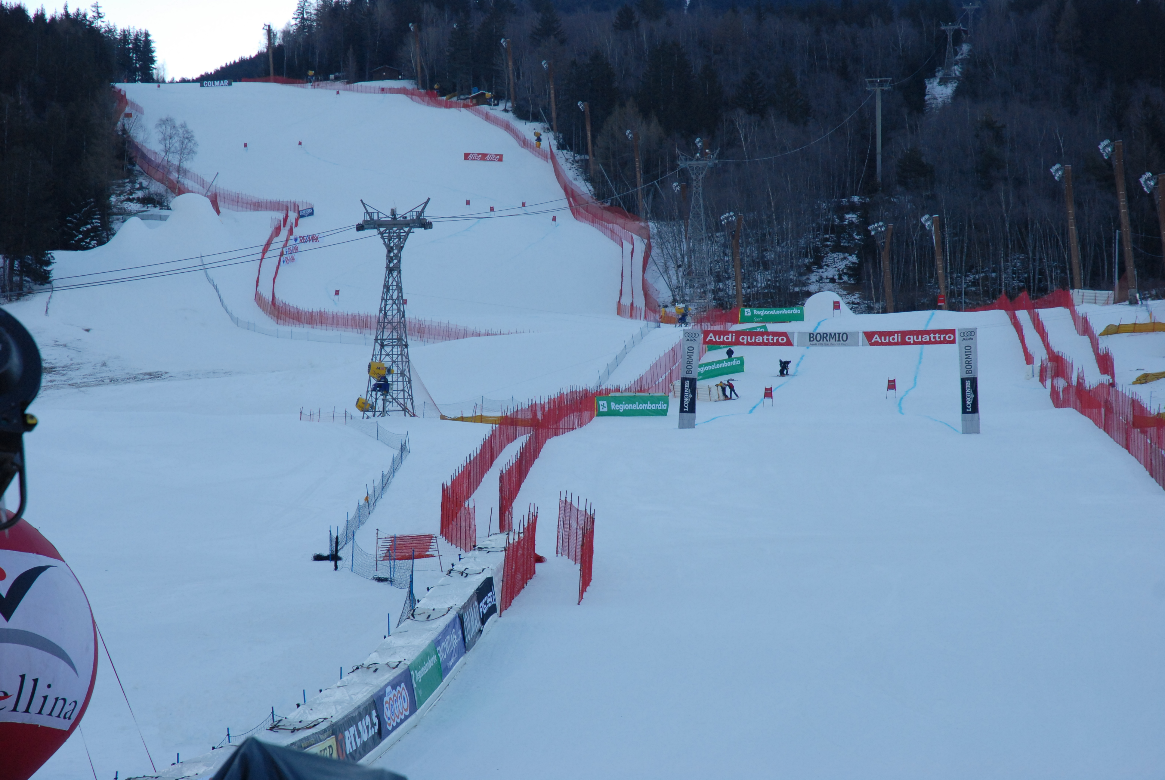 Pista Stelvio (Bormio)